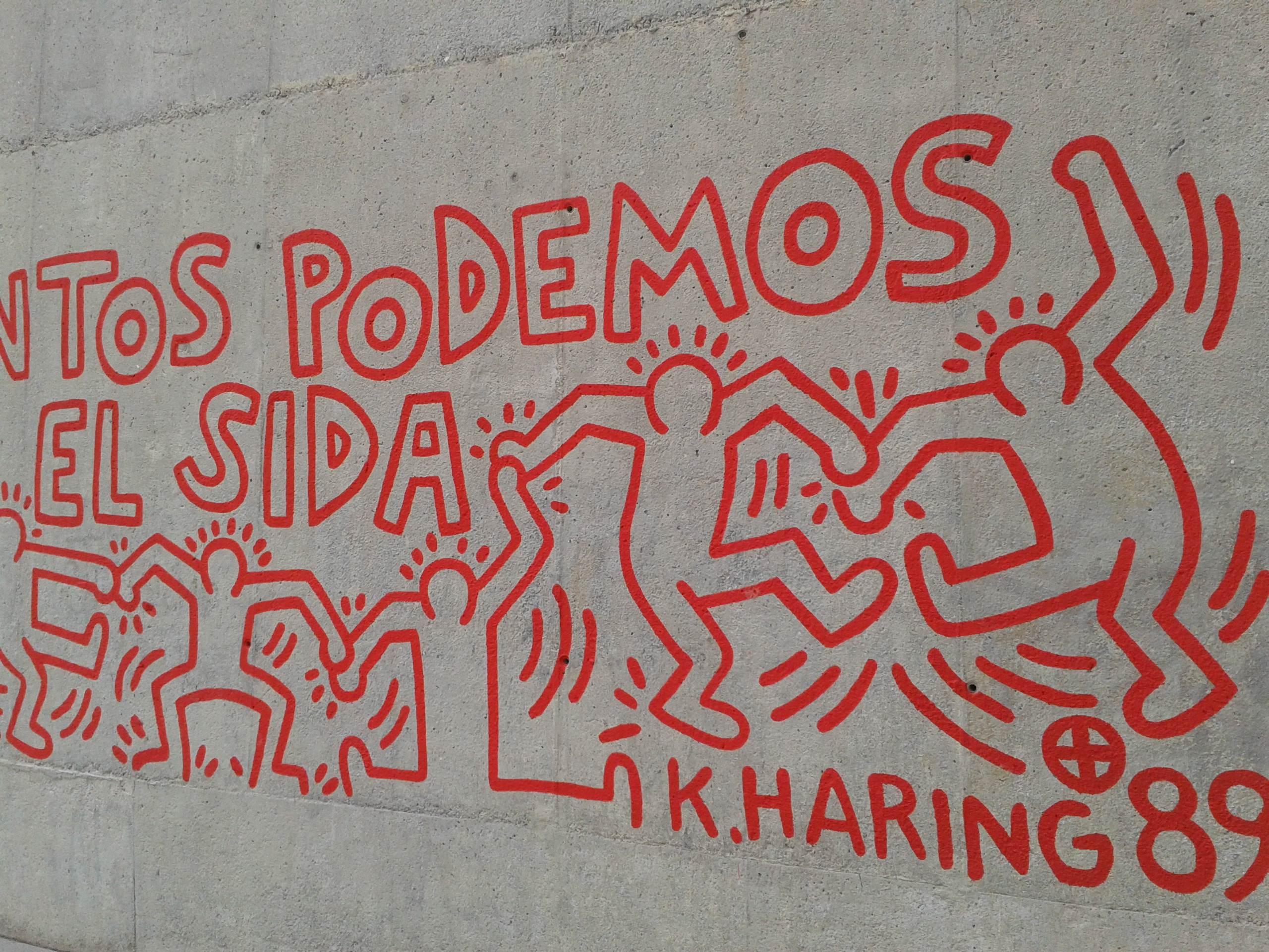 Vista parcial de la reproducció del mural "tots junts podem parar la SIDA" de Keith Haring